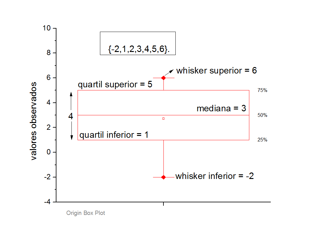 Diagrama de Caixa, indicando a mediana, os quartis e os whiskers.